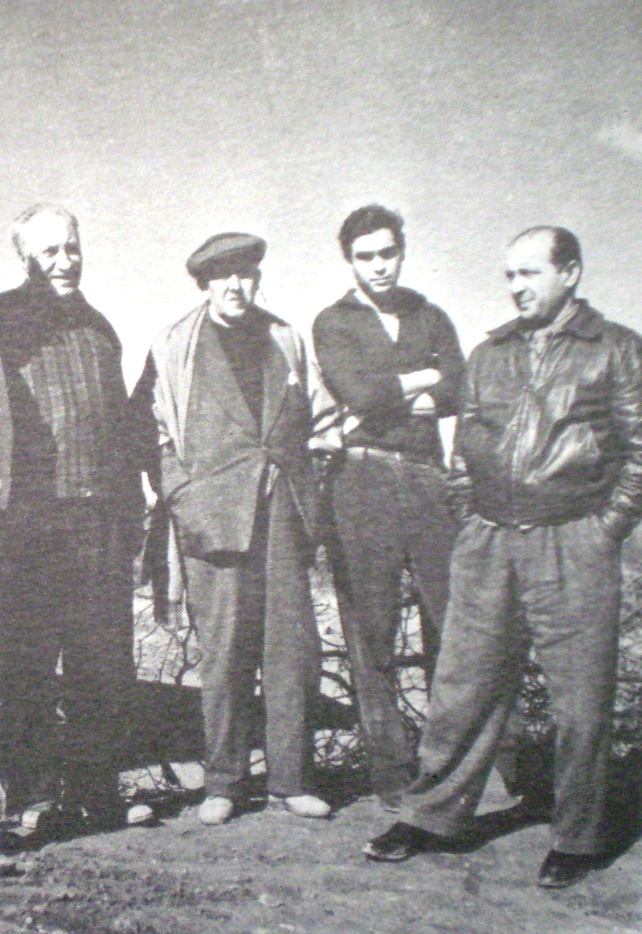 Juan Carlos Castagnino, Lino Enea Spilimbergo, Carlos Alonso y Antonio Berni en Rio Hondo, Santiago del Estero en 1958 (cuatro gigantes de la pintura argentina)